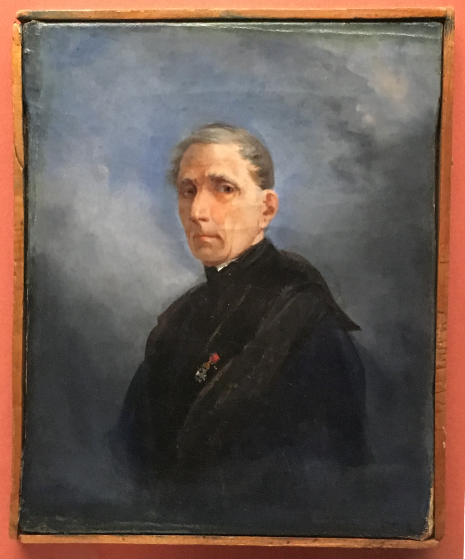 Autoritratto di Salvatore Fergola a 65 annititle QS:P1476,it:"Autoritratto di Salvatore Fergola a 65 anni" label QS:Lit,"Autoritratto di Salvatore Fergola a 65 anni"